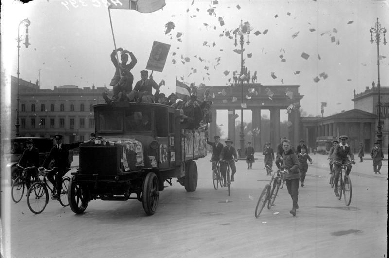 Zur Reichstagswahl am 4. Mai 1924. Der deutsche Reichskanzler Marx wählt. Völkische Wahlpropaganda auf Lastautos vor dem Brandenburger Tor.